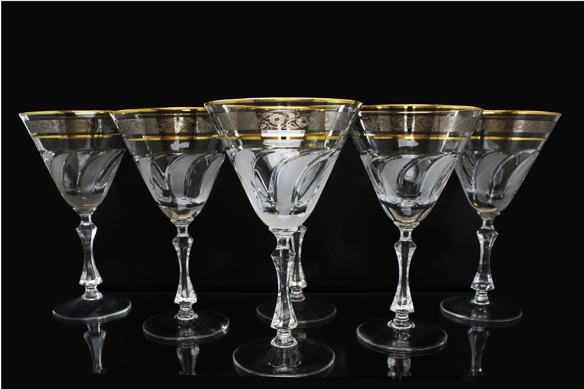 Хрустальный бокал с ручной обработкой золотом и платиной